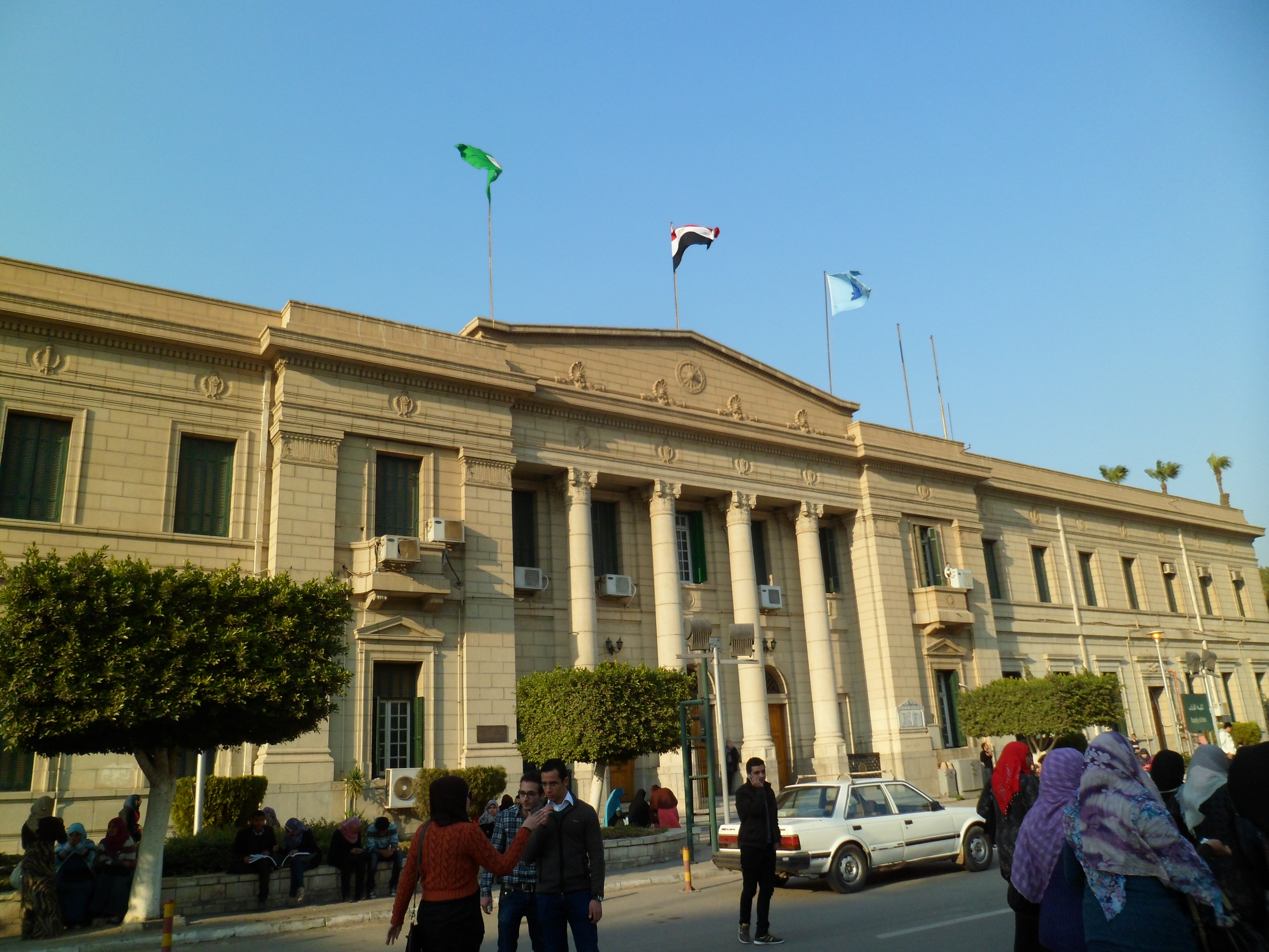 كلية الآداب، جامعة القاهرة.